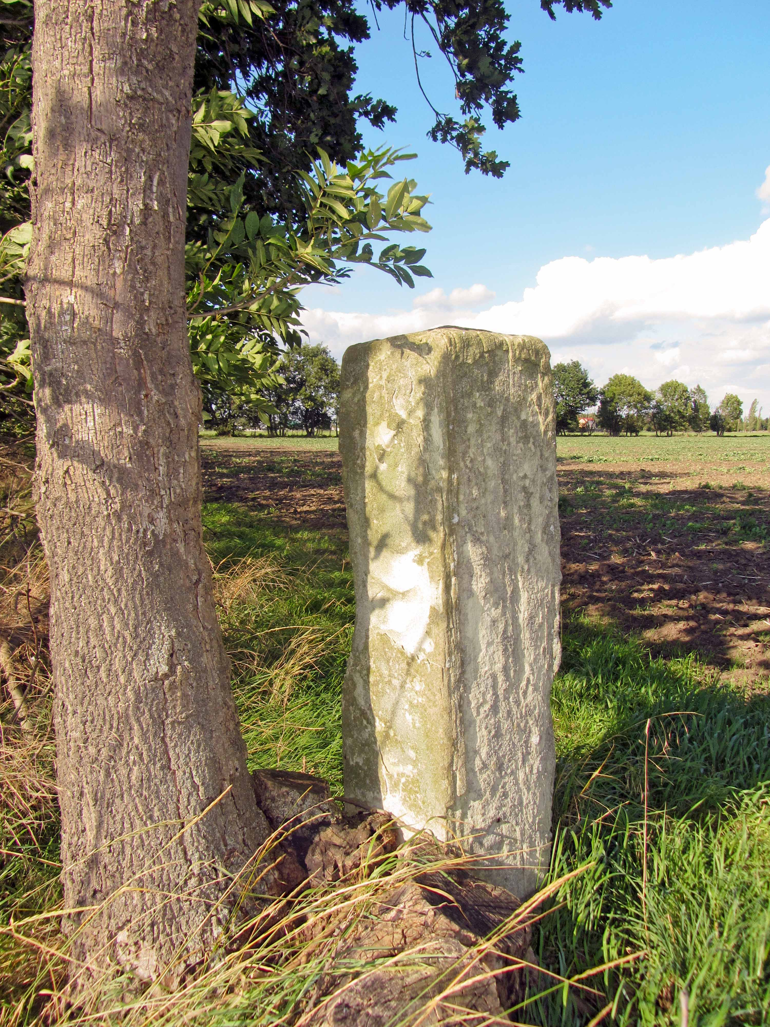 Grenzstein Nr. 63 Historische Landesgrenze Königreich Sachsen Königreich Preußen 1815 (Wiener Kongress)